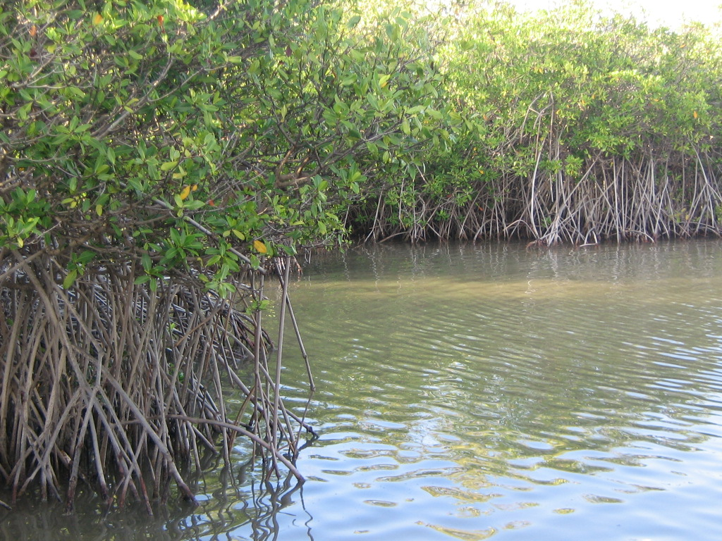 Palétuvier rouge à l'étang des Salines (Martinique)